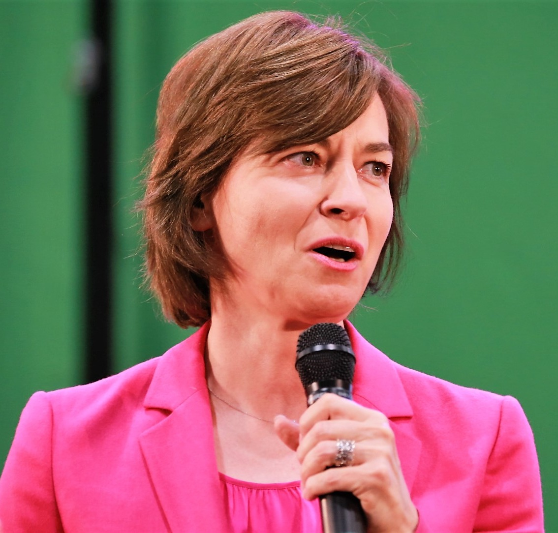 Maybrit Illner in einer Gesprächsrunde auf dem 100. Deutschen Katholikentag